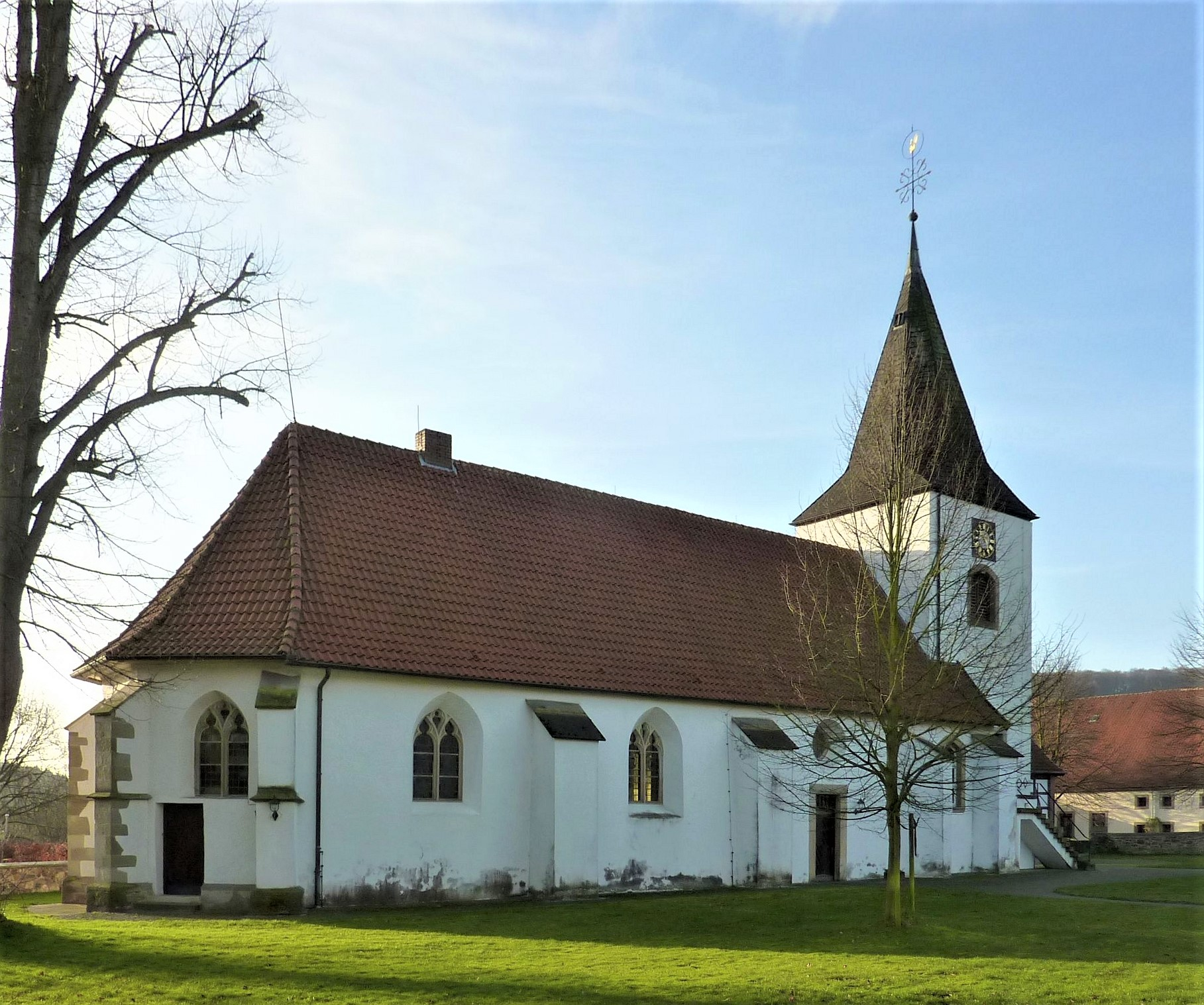 Katharinenkirche (Bad Essen-Barkhausen)